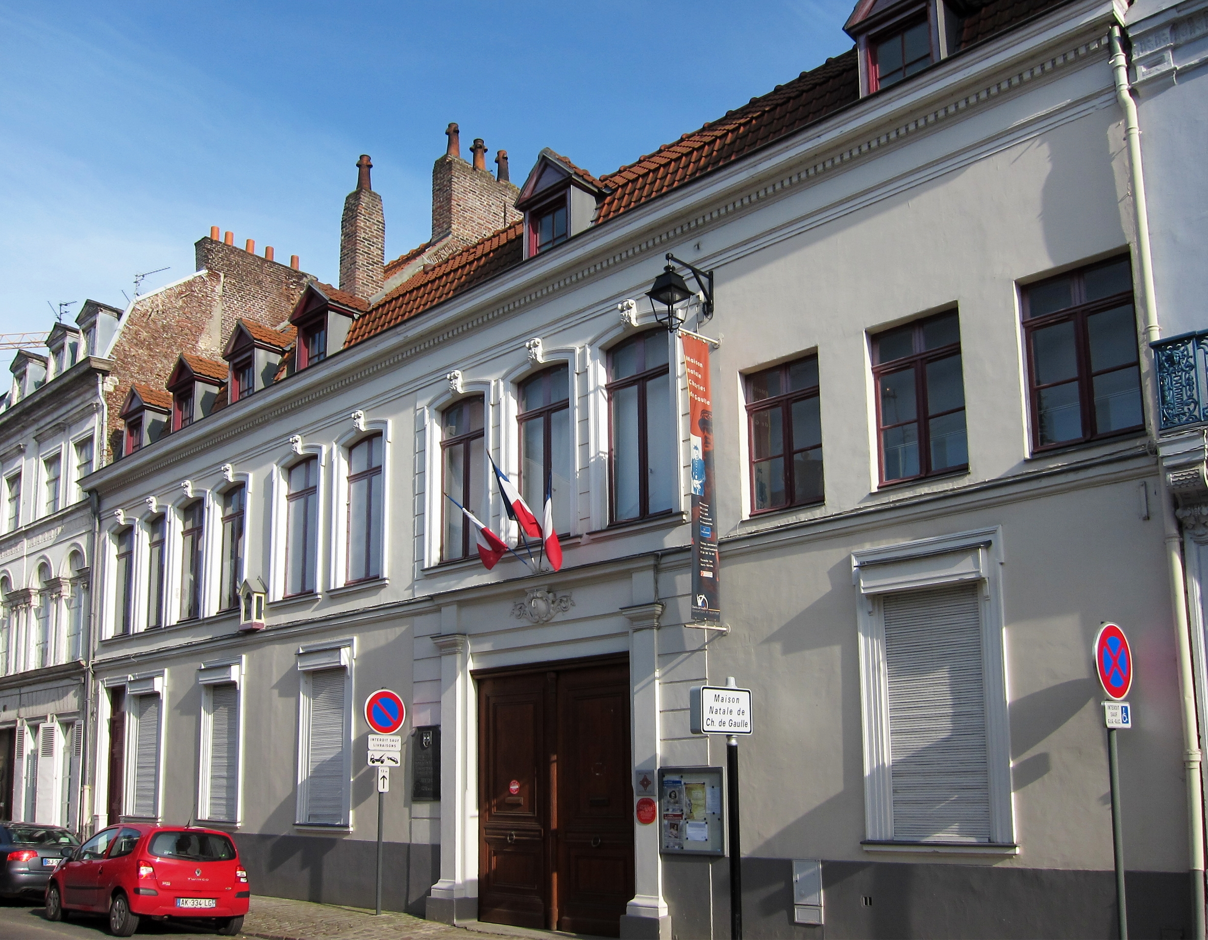 Maison natale du Général de Gaulle 9 rue Princesse à Lille.